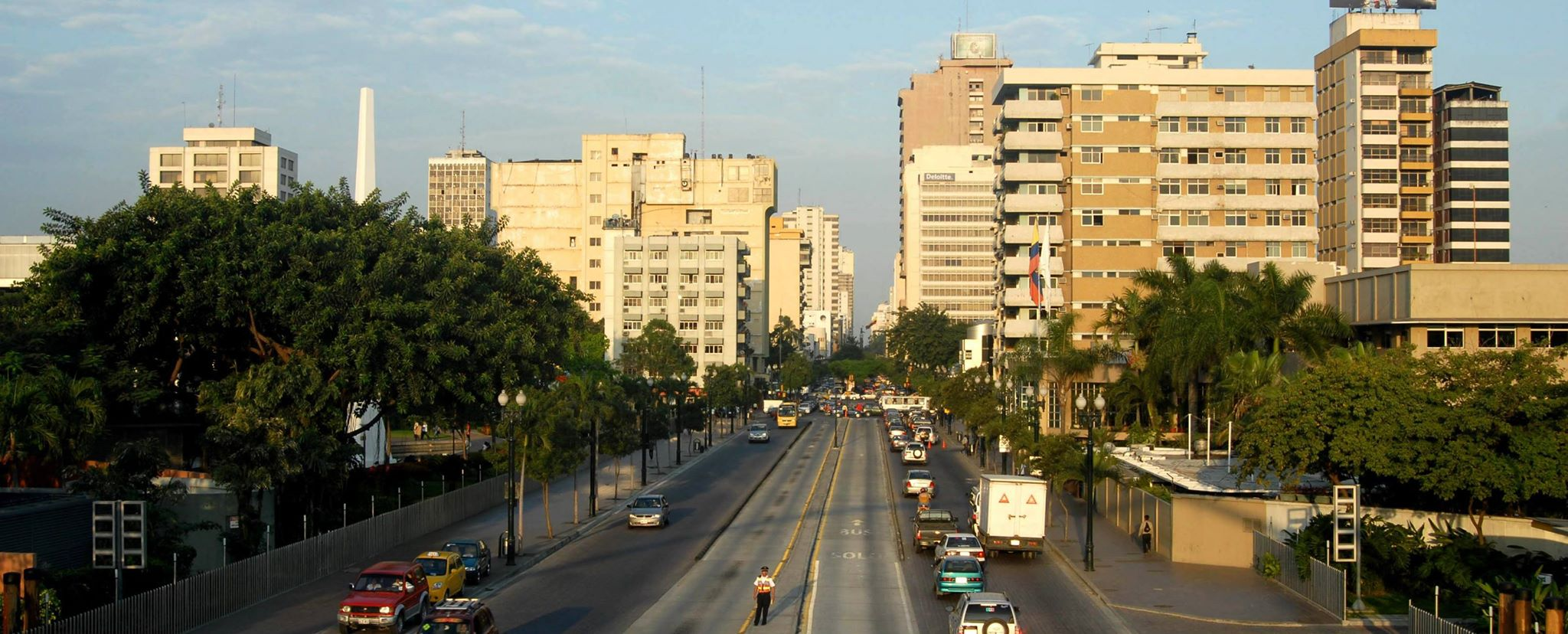 Bulevar Nueve de octubre